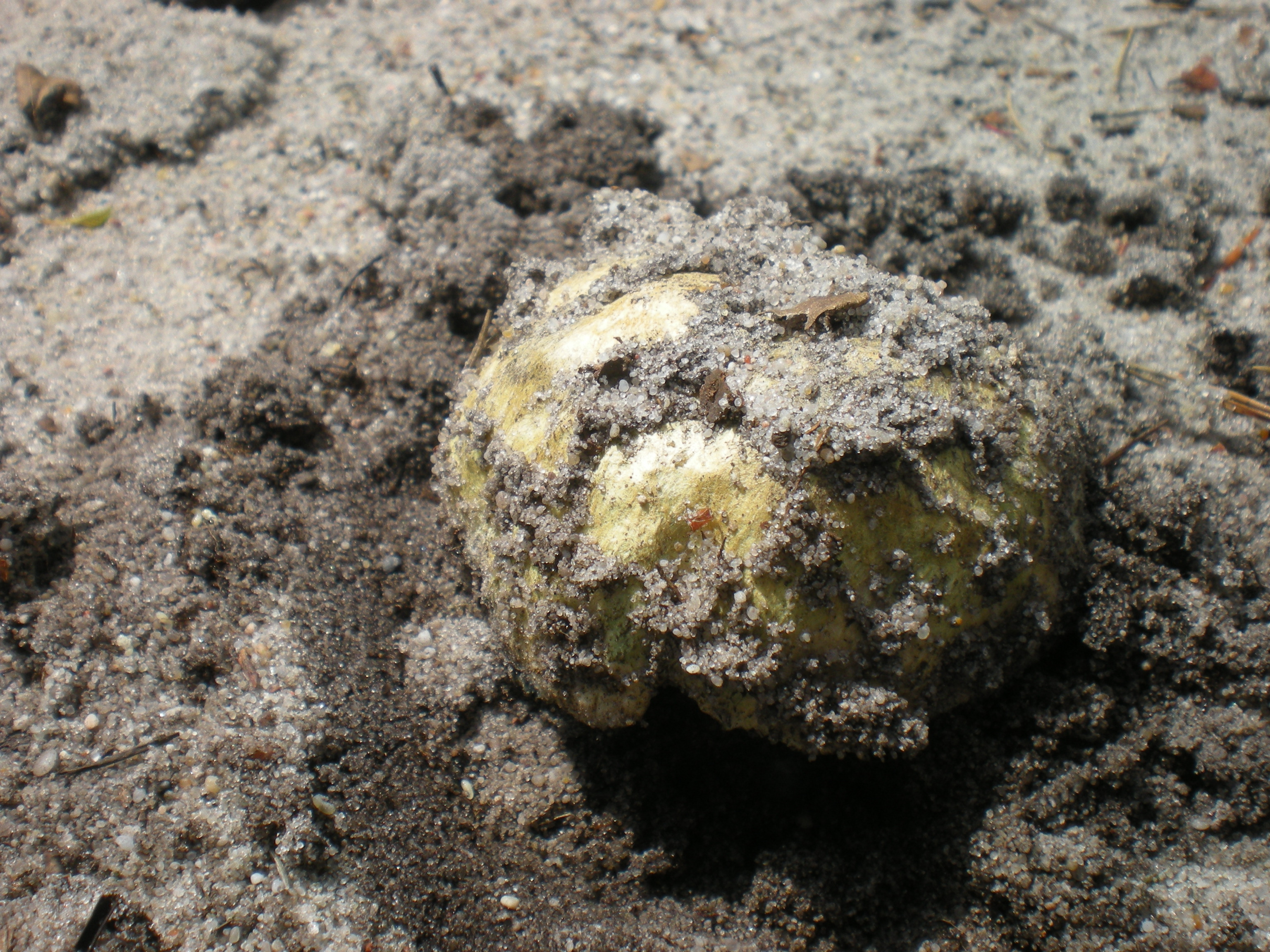 Kornblumen-Röhrling (Gyroporus cyanescens) in Polen